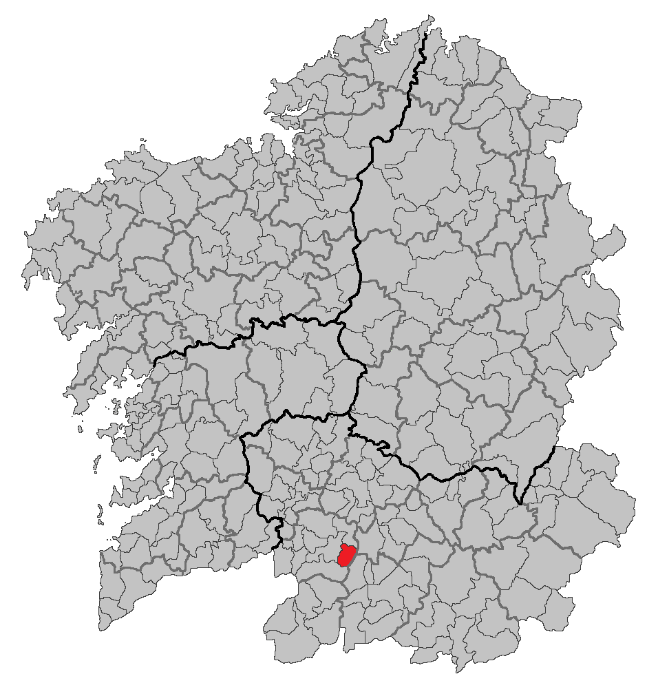 Mapa coa localización do concello de A Bola.